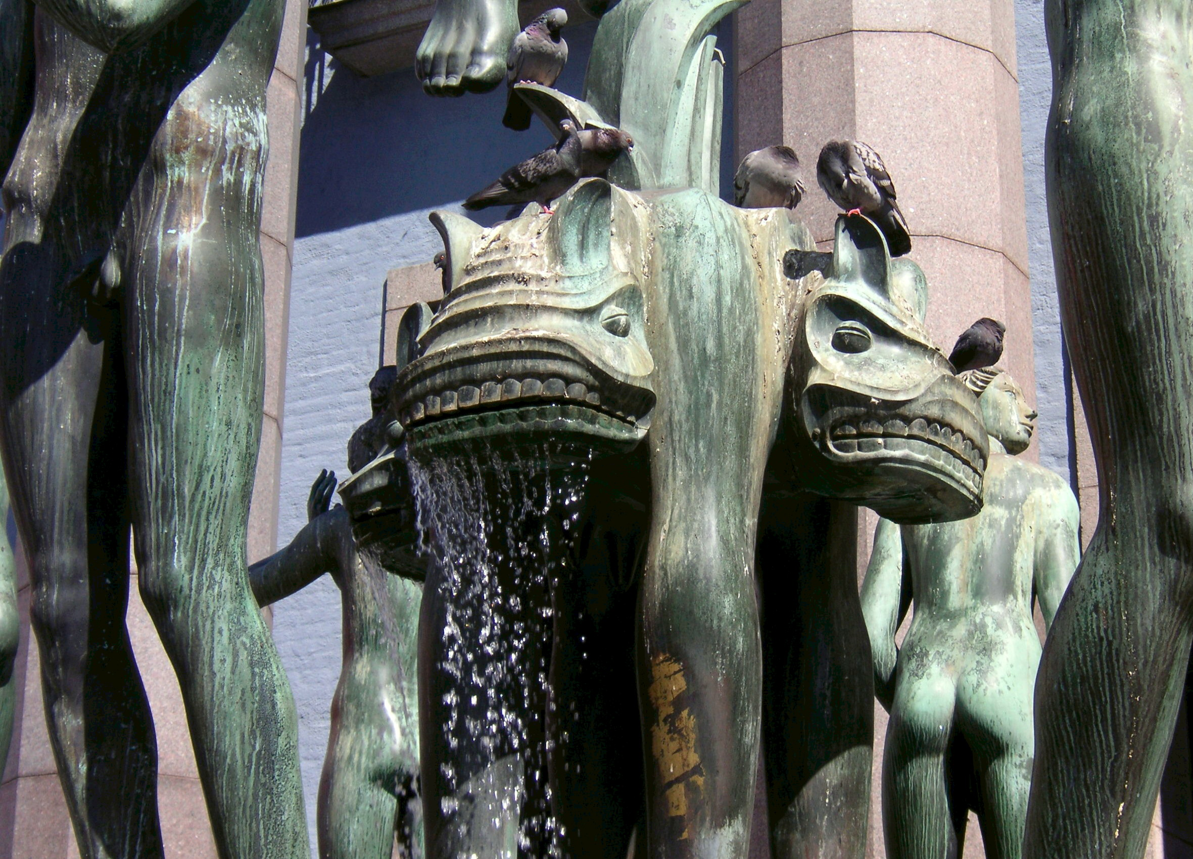 Carl Milles "Orfeusgruppen" vid Konserthuset i Stockholm, detalj